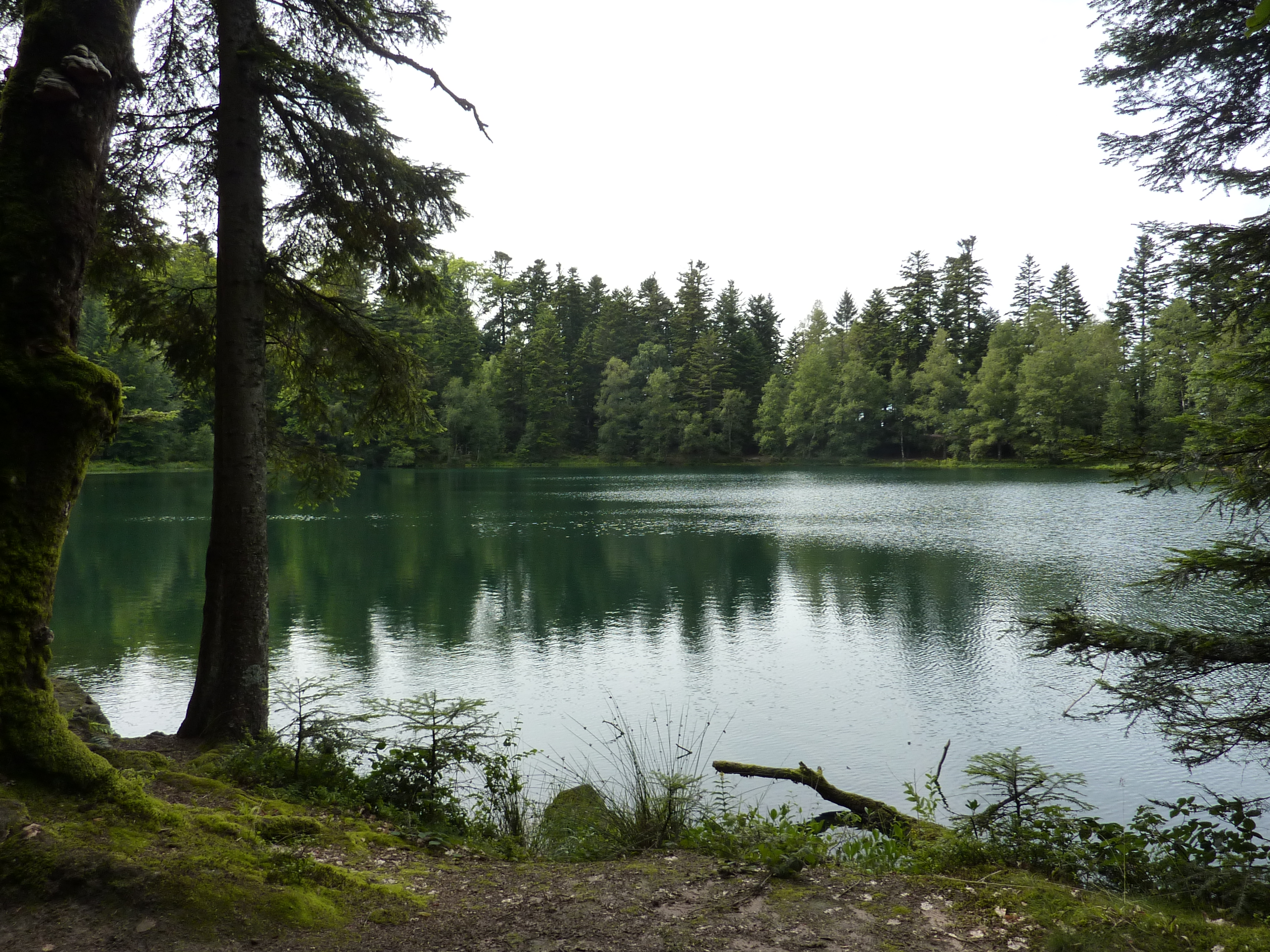 Lac de la Maix, commune de Vexaincourt, France.